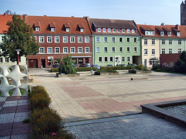 Stralsund. Rathausplatz